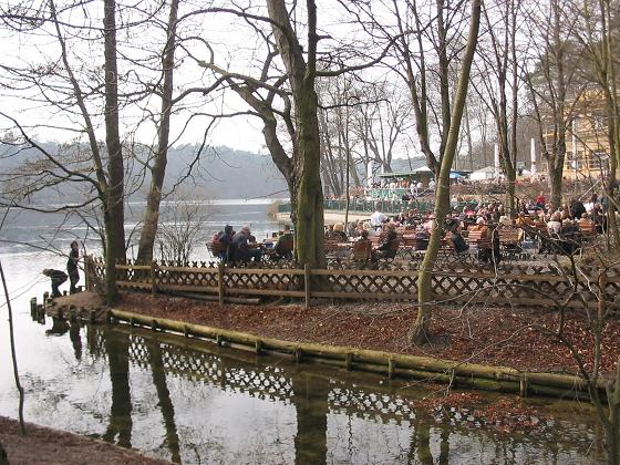 Schlachtensee, Berlin Steglitz-Zehlendorf, Restaurant Fischerhütte